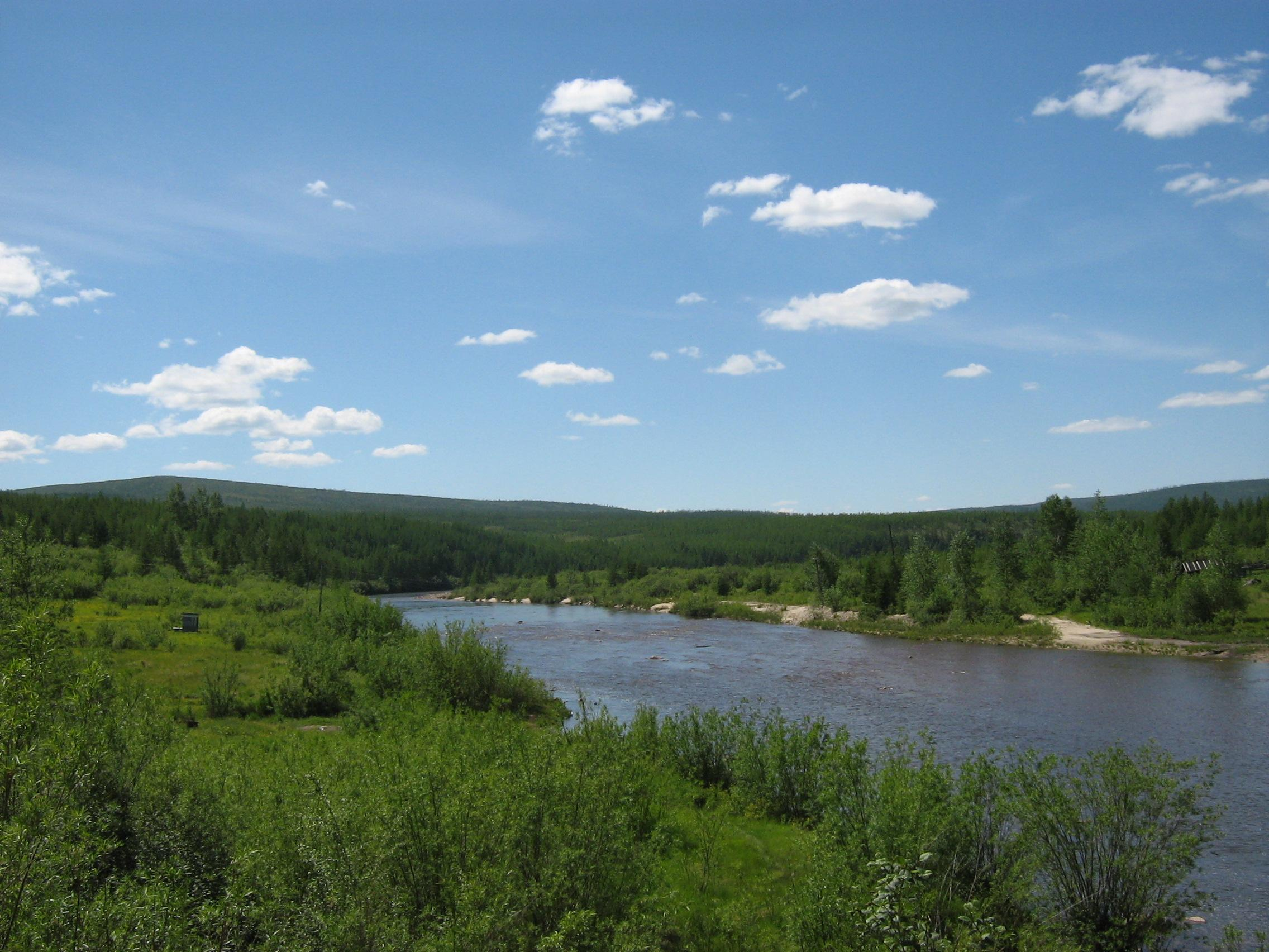 Река Тимптон